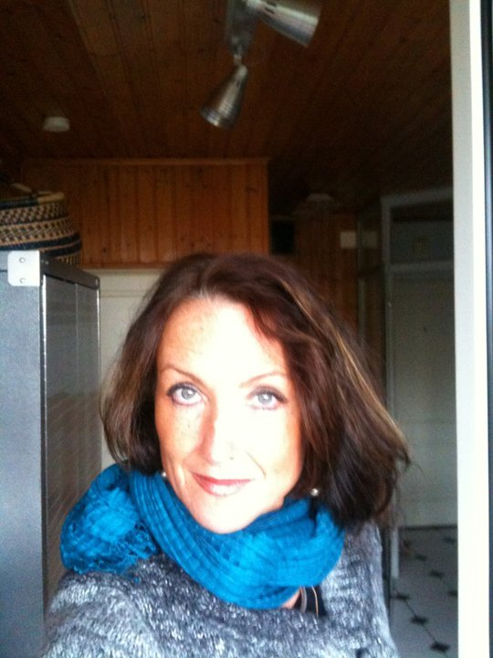 Angélique Eileen Roswitha Damschen